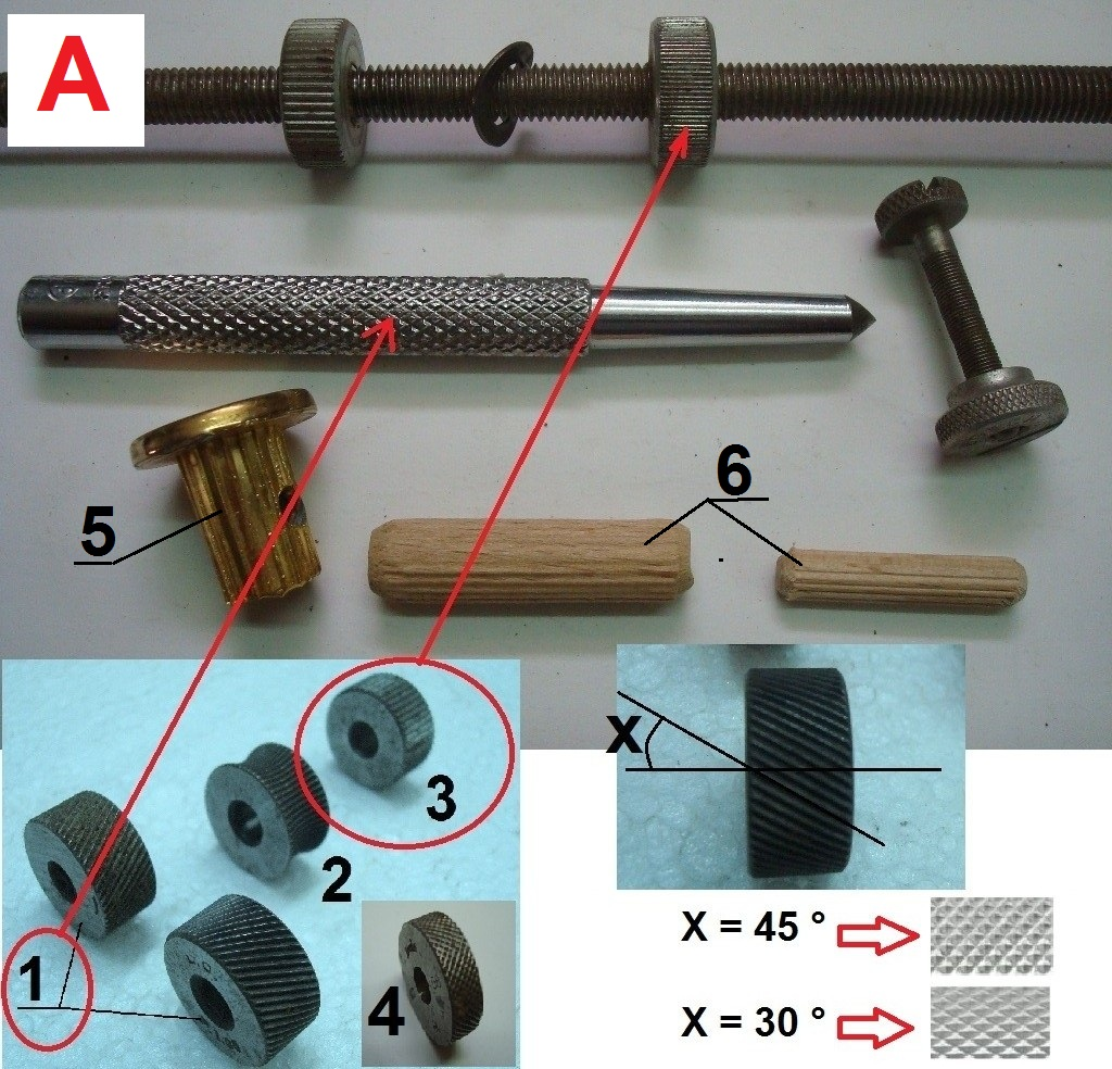 Types de molettes et travail réalisé (outils et photo personnels)